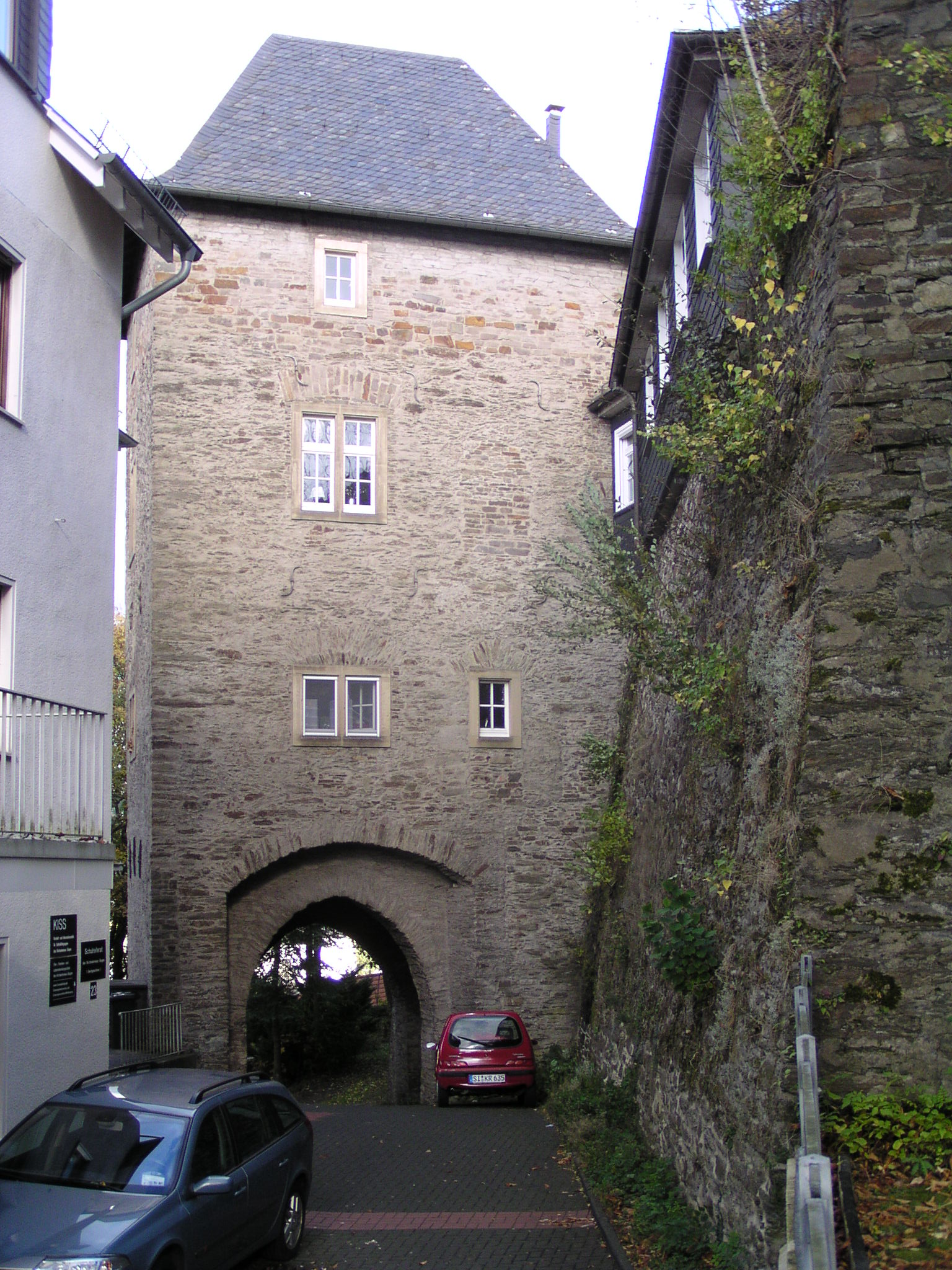 Die Marburger Pforte am Oberen Schloss in Siegen in Westfalen; ein Bestandteil der historischen Stadtbefestigung. Ansicht von Südwesten (Stadt-Innenseite). Rechts im Bild ein Teil der Schlossmauer.